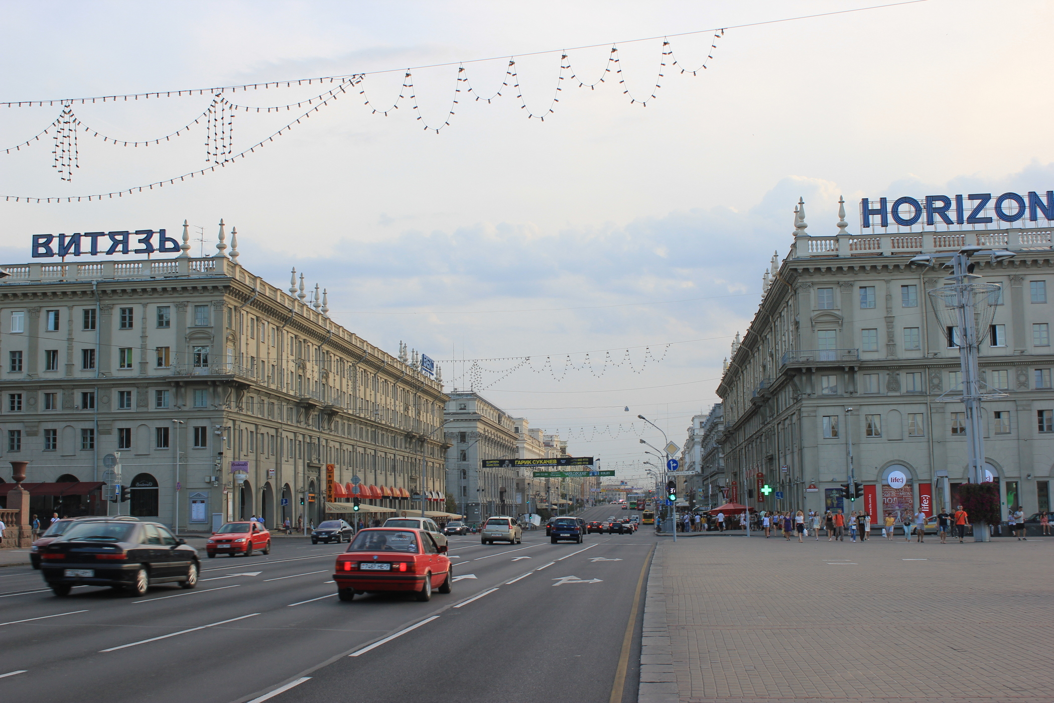 Unabhängigkeitsprospekt und Oktoberplatz in Minsk, Belarus.